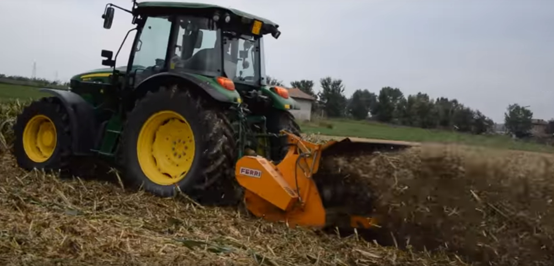 Косилка-мульчировщик при уборке пожнивных остатков